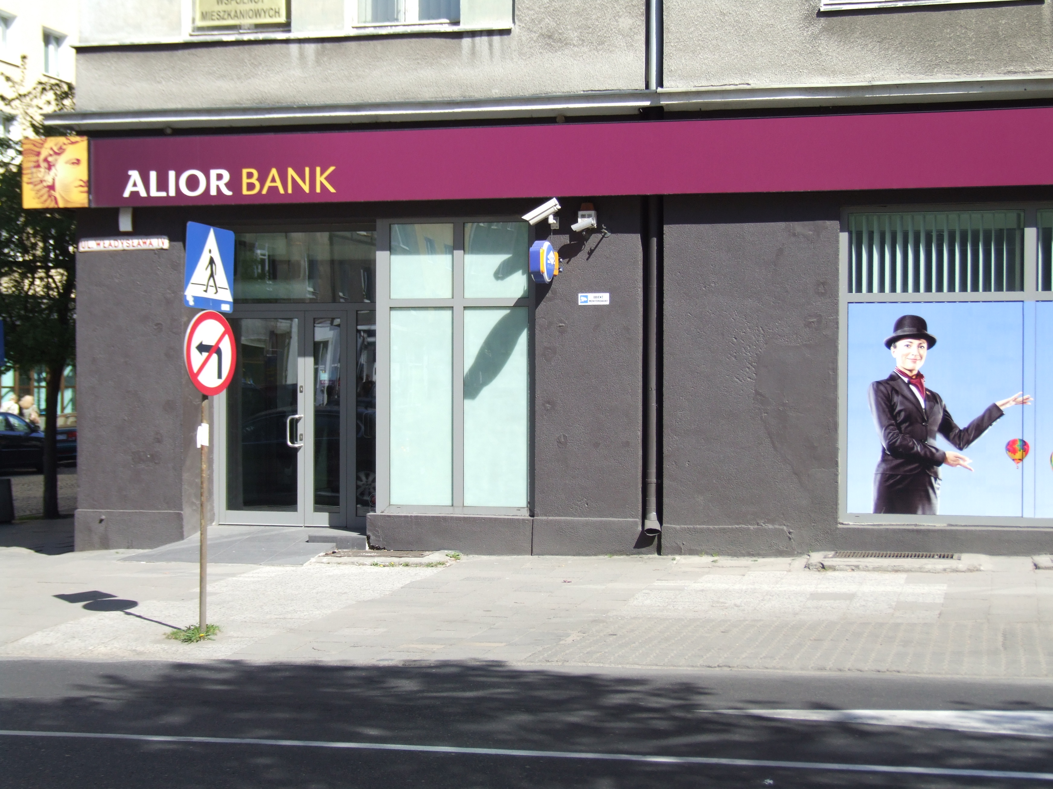 ulica Władysława IV - Alior Bank, Gdynia